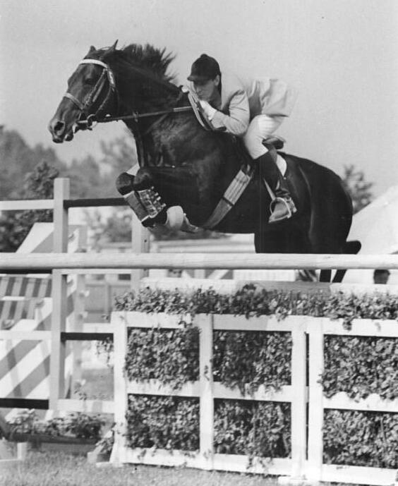 Zentralbild / Kluge / 20.6.1968 [Herausgabedatum] / Ma. / Leipzig: Großer Preis der DDR im Springreiten am 19.6.1968. Im Großen Preis der DDR, der über einen 960 m langen mit 14 Hindernissen (17 Sprüngen) ausgerüsteten Parcours führte, triumphierte im zweiten Stechen Samosedenko (UdSSR) auf Amron fehlerpunktfrei in 56,8 s.